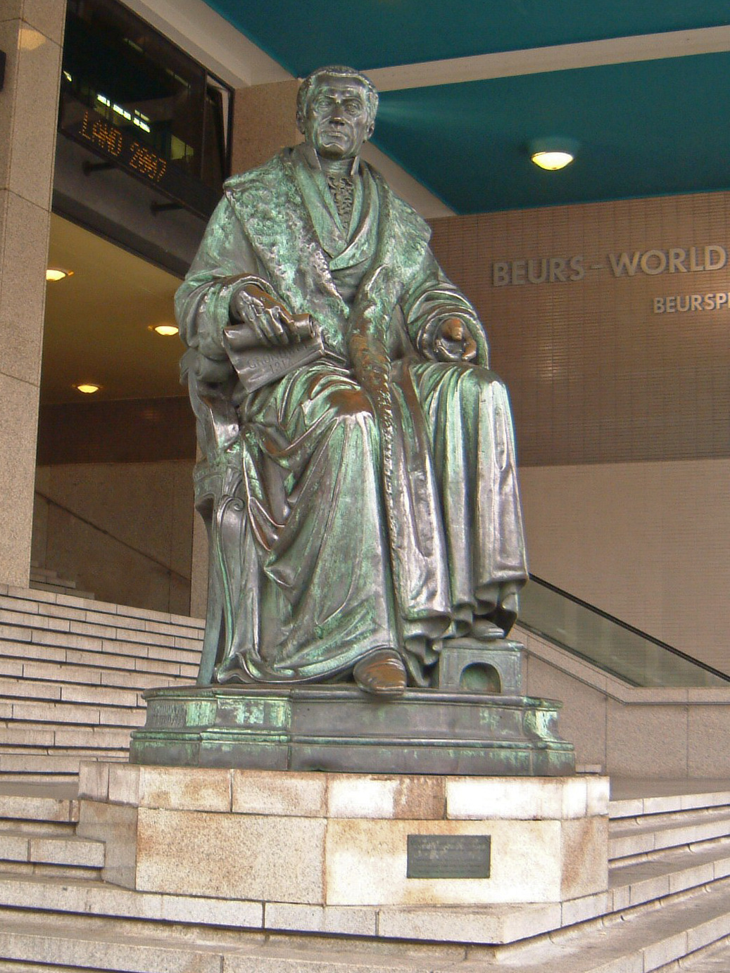 statue of Gijsbert Karel van Hogendorp at the Beurs World Trade Center in Rotterdam, the Netherlands.